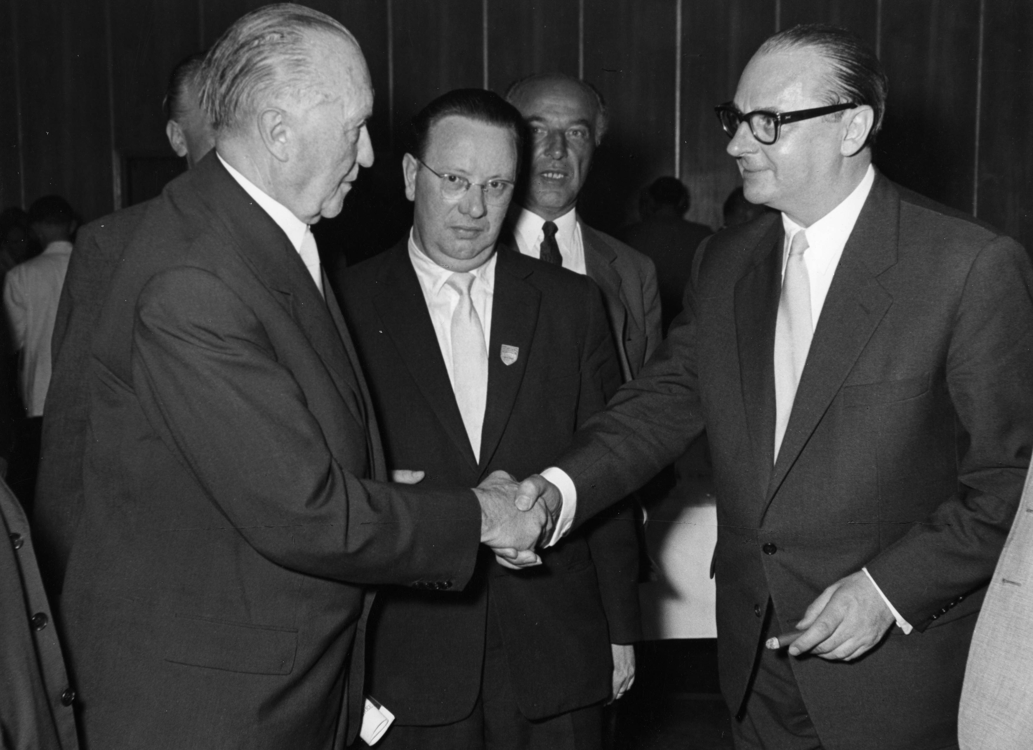 Adenauer, Konrad7. CDU-Bundesparteitag, 12.05.1957 - 15.05.1957